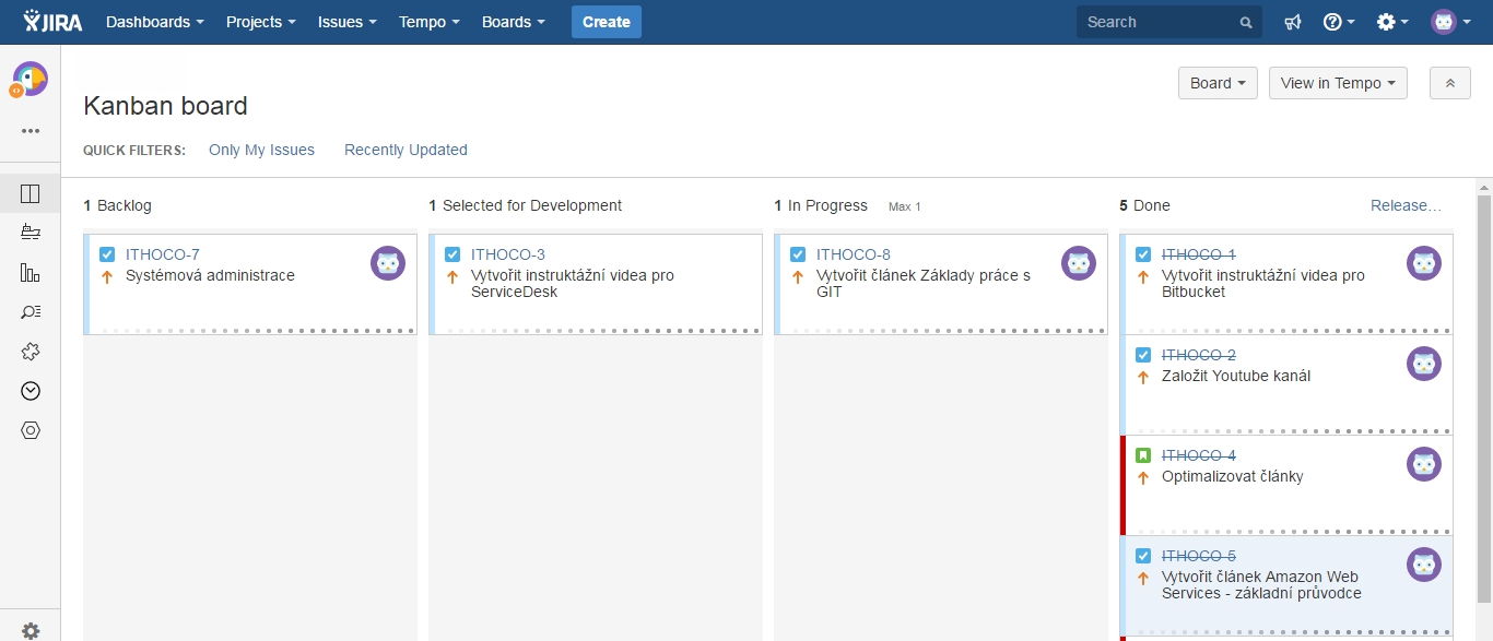 Ukázka Kanban prostředí produktu Jira Agile firmy Atlassian